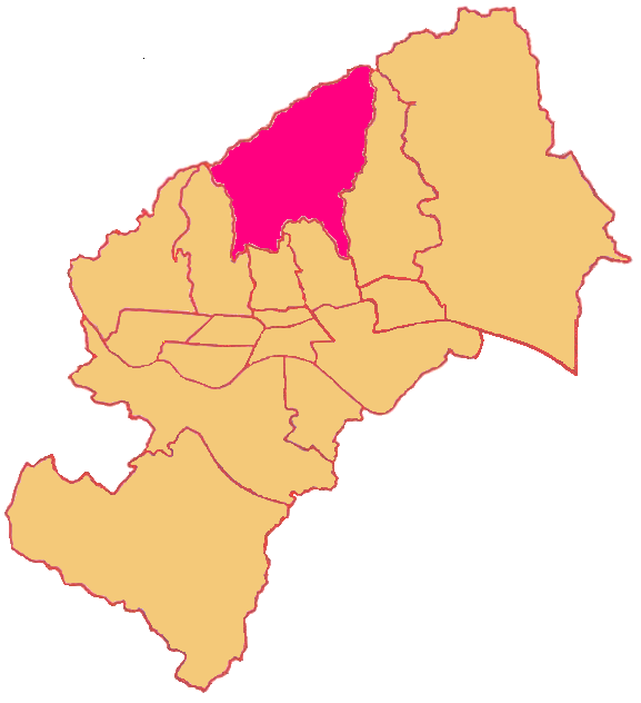 Map of Podsljeme District in Zagreb (Gradska četvrt Podsljeme)